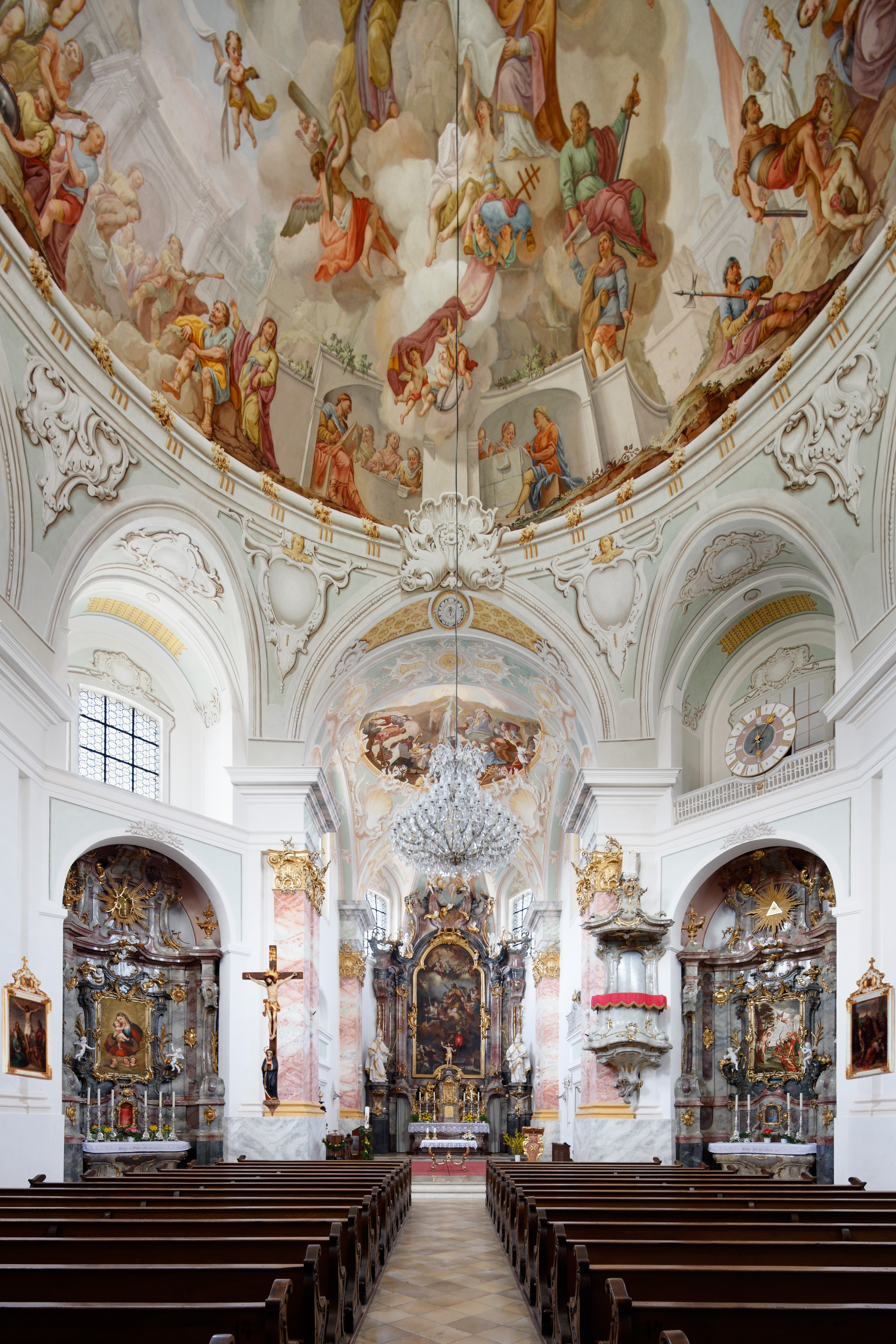 Innenaufnahme der Pfarrkirche St. Clemens Eschenlohe mit Deckenfresko von Johann Jakob Zeiler und Hochaltar von Johann Baptist Straub.